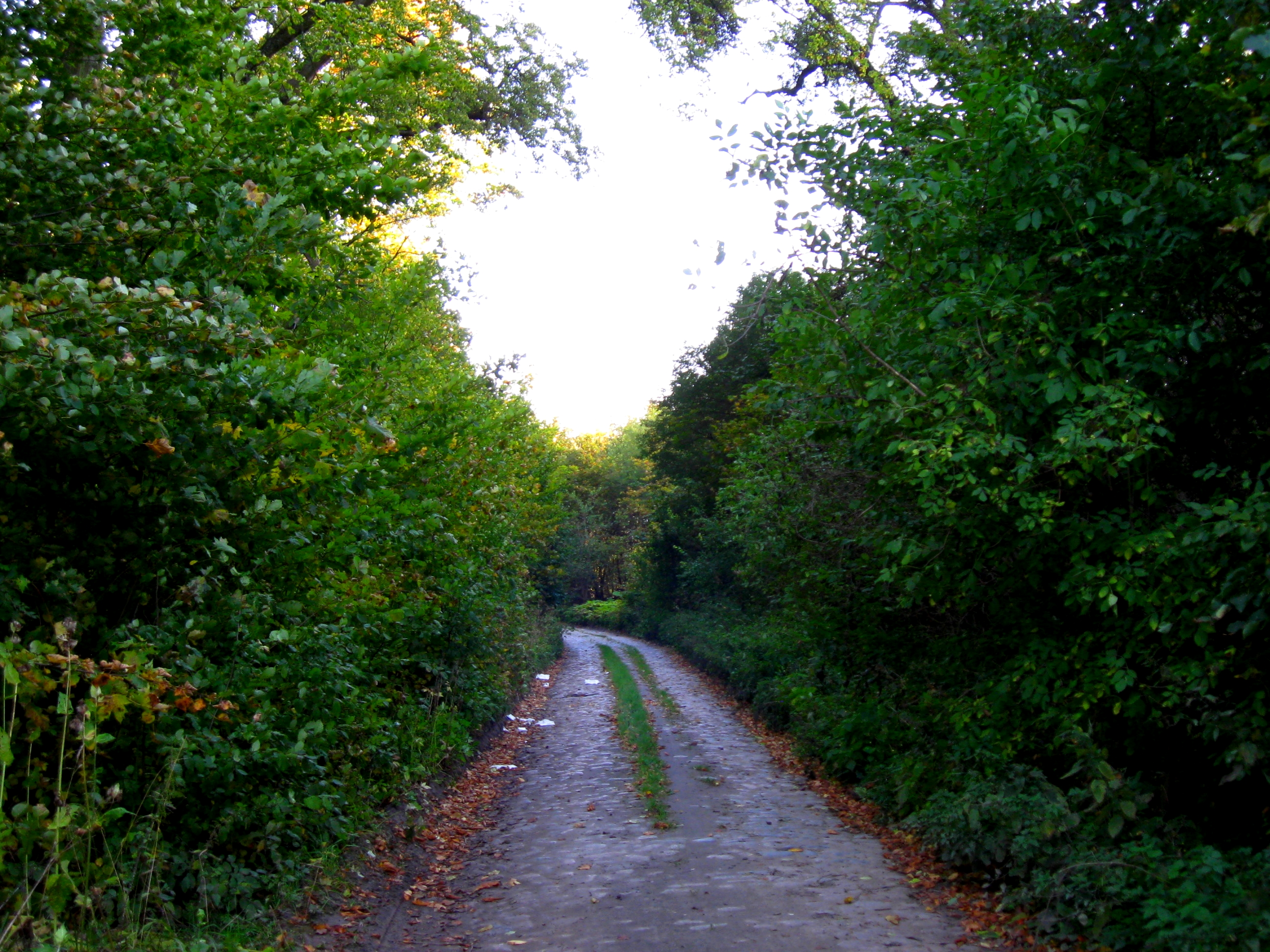 Bielkowo - park dworski, XVIII, XIX